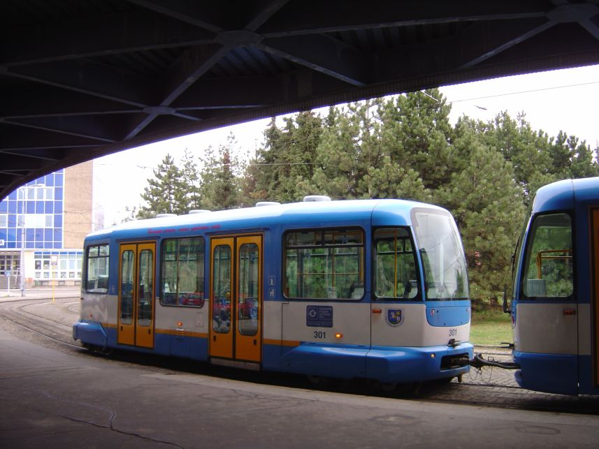 Vlečný vůz VV60LF v Ostravě